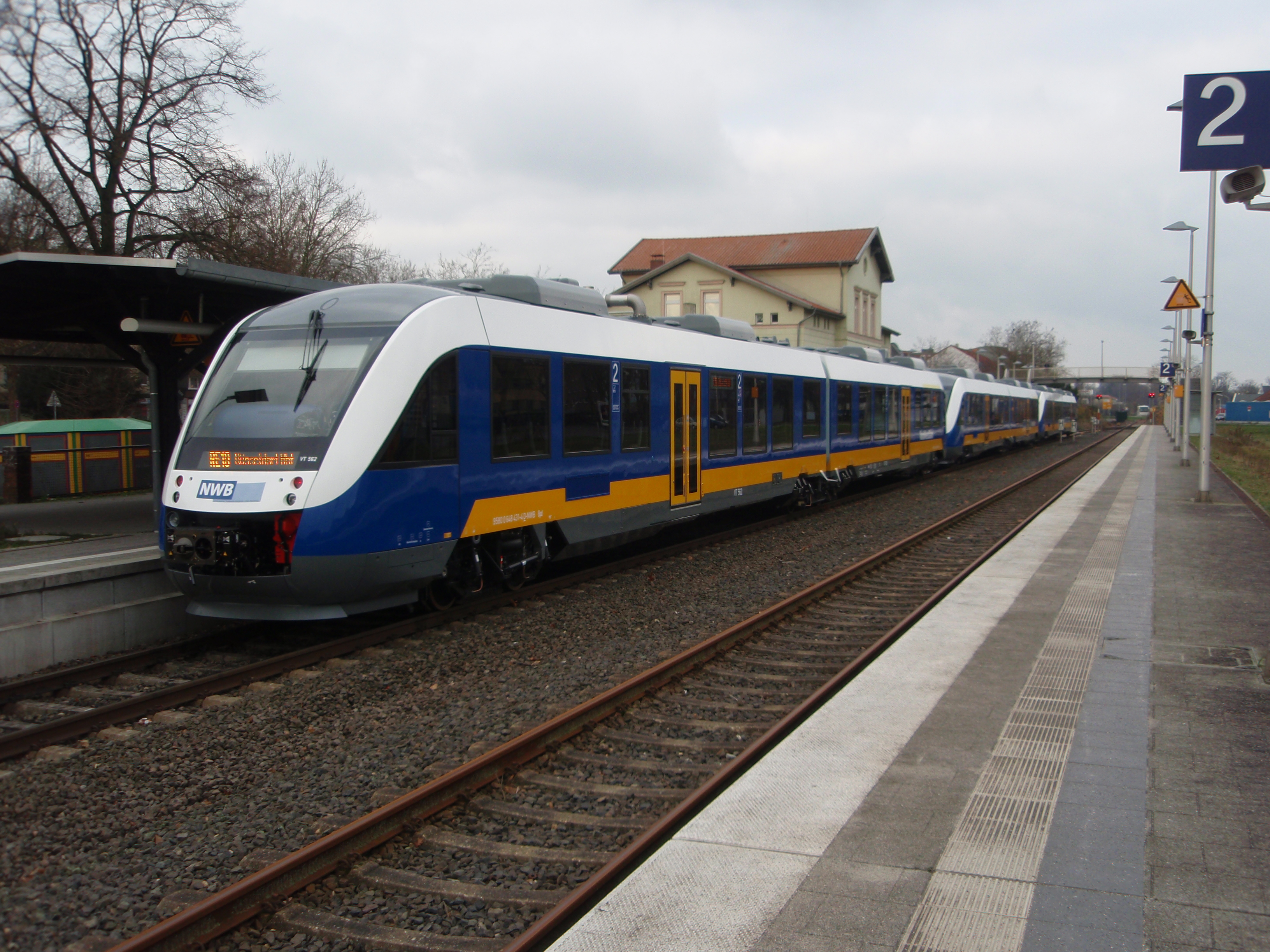 VT 562 der NordWestBahn als RE 10 nach Düsseldorf Hbf in Kleve.